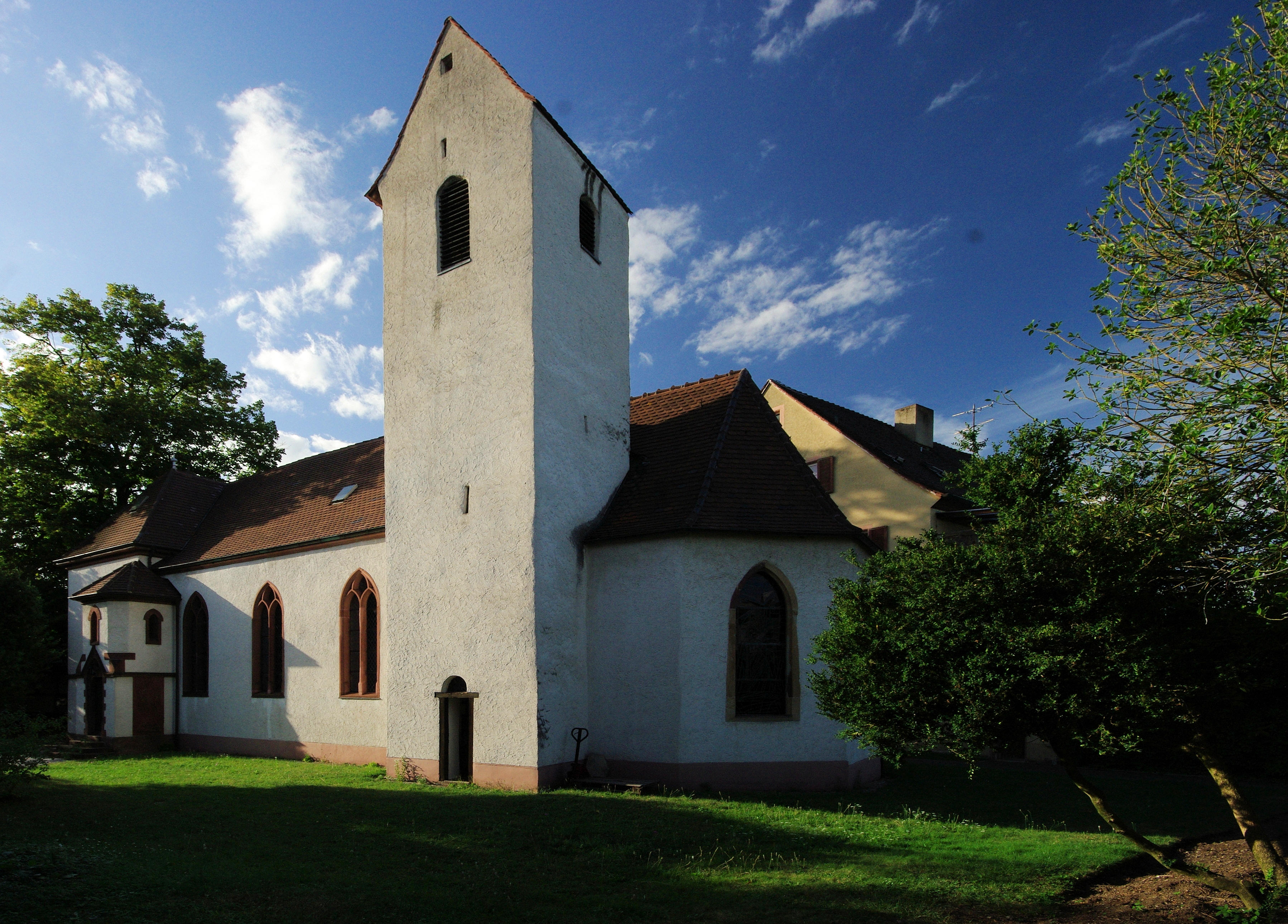 Melanchthonkirche